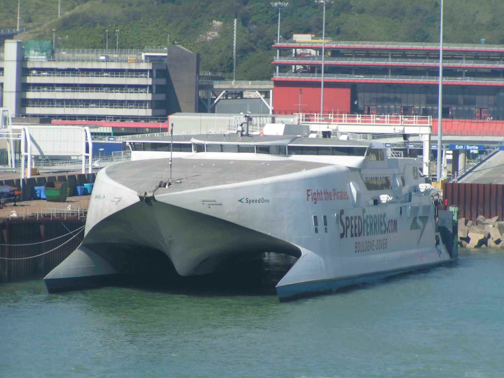 Katamaran_in_Dover